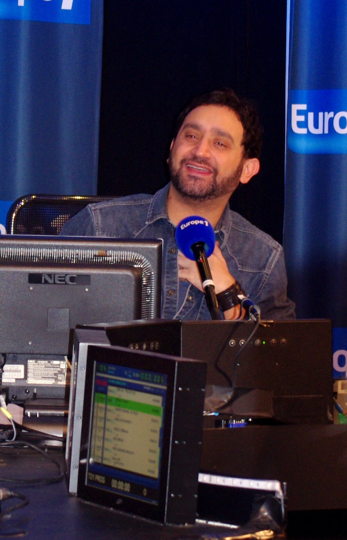 Cyril Hanouna dans l'émission de radio "Les pieds dans le plat" en 2014.